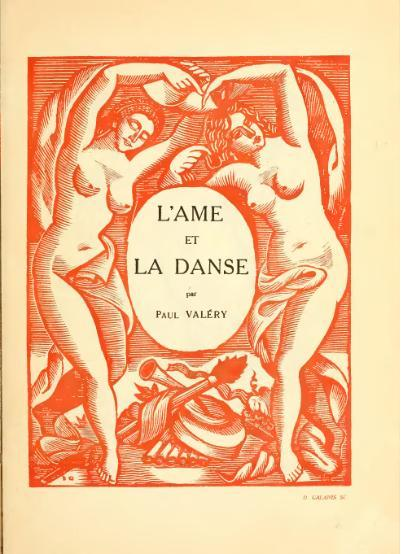 L'ame et la dance-pagdjvu/007